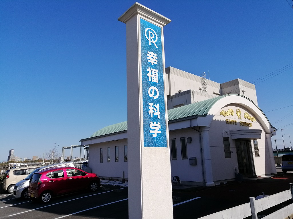 幸福の科学 大府支部（所在地は知多郡東浦町）